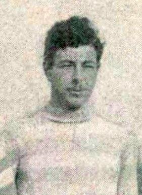 Hubert Lefèbvre en 1899.